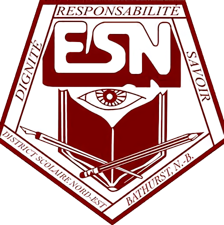 ネピジグイット高等学校のロゴマーク。